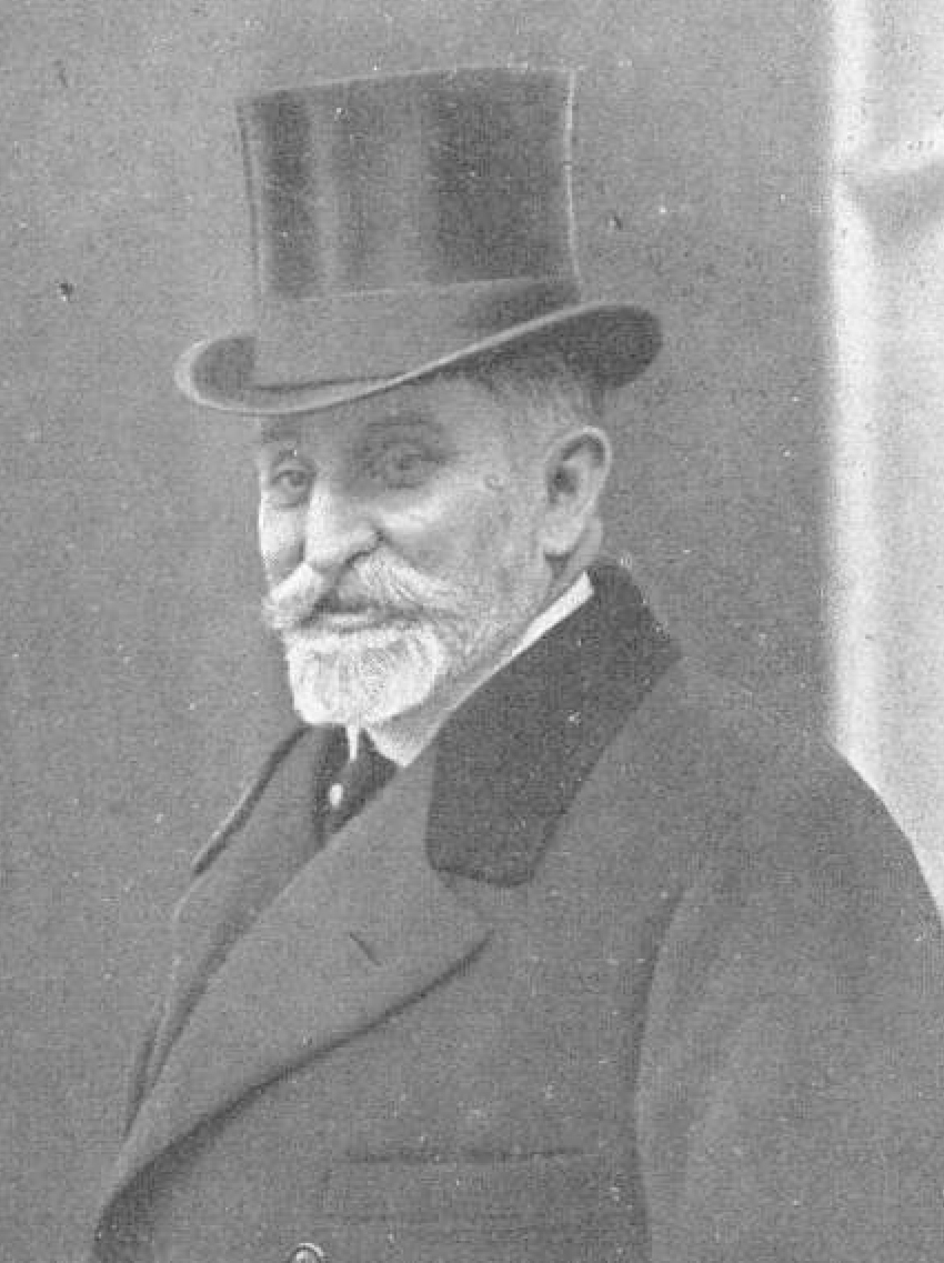 García Prieto y Geoffray.